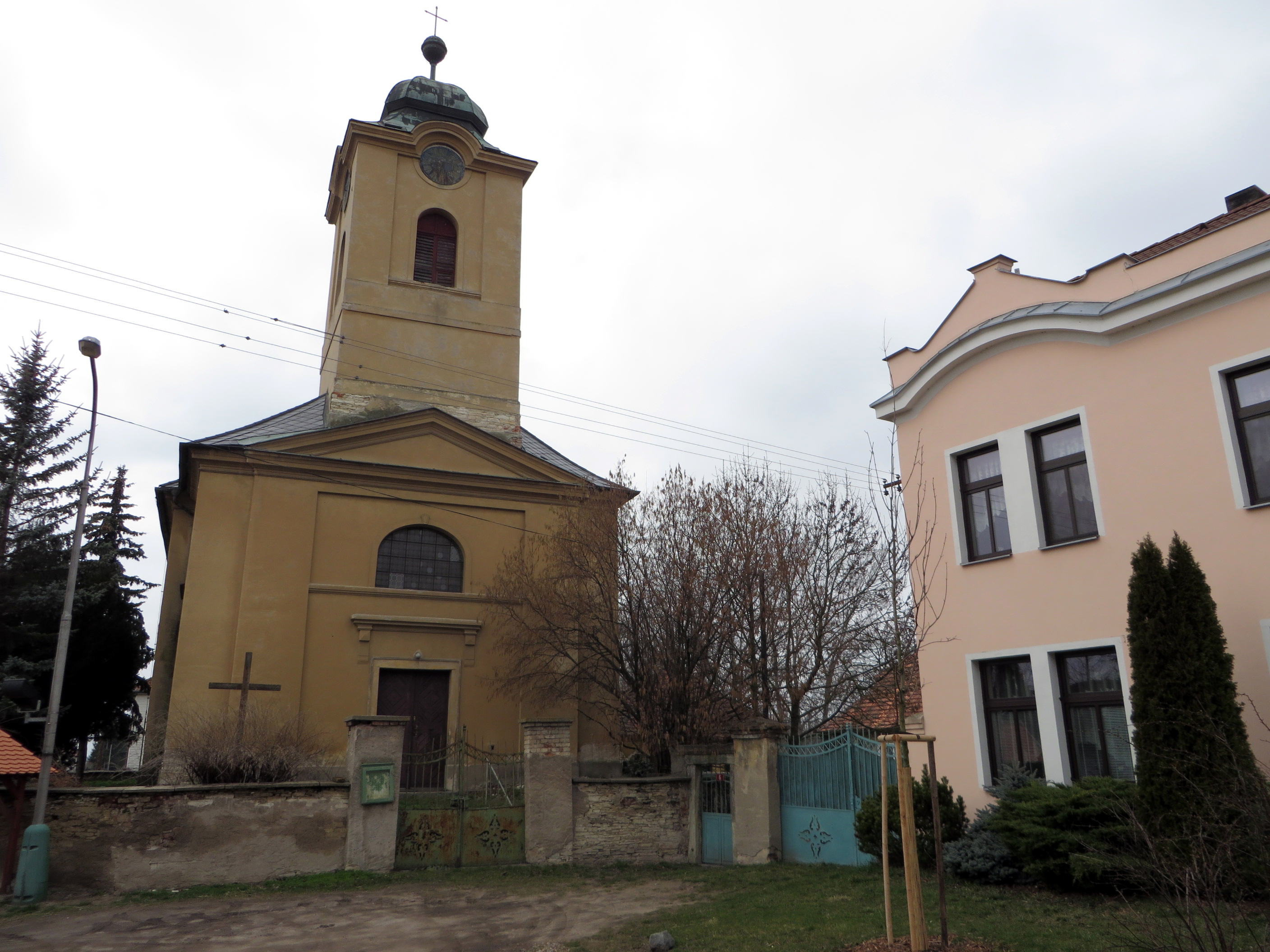 Sány. GPS: 50.1260633N, 15.2467517E